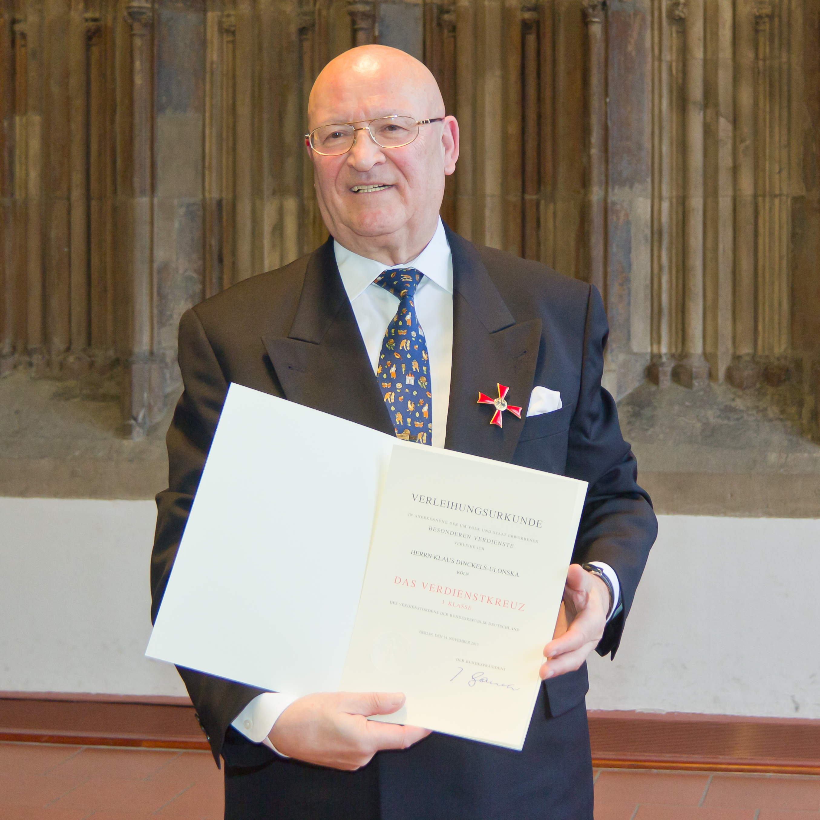 Verleihung des Bundesverdienstkreuzes 1. Klasse an Klaus Ulonska Foto: Klaus Ulonska präsentiert die Verleihungsurkunde